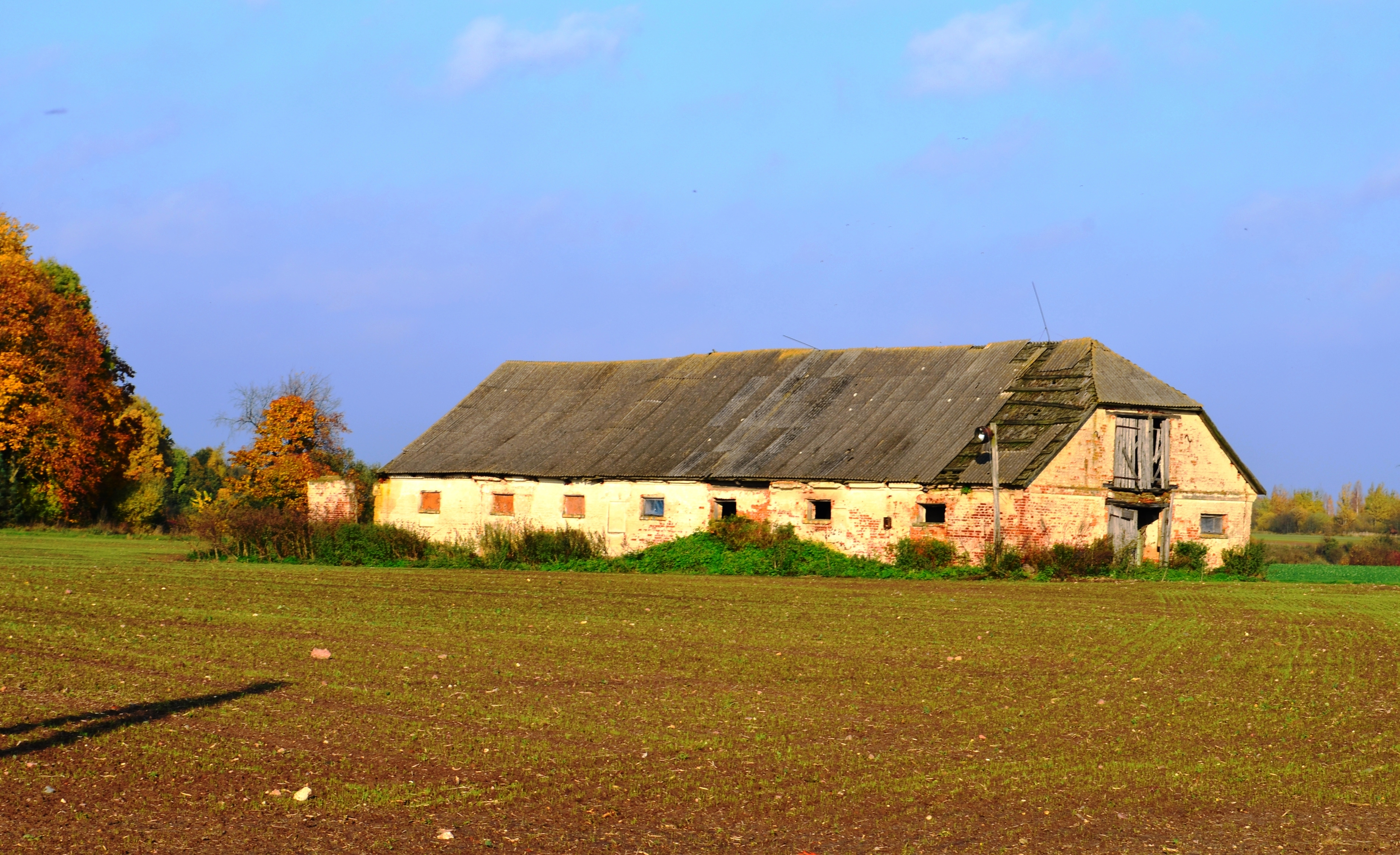 Senas ūkinis pastatas, Valkaičiai, Kėdainių raj.